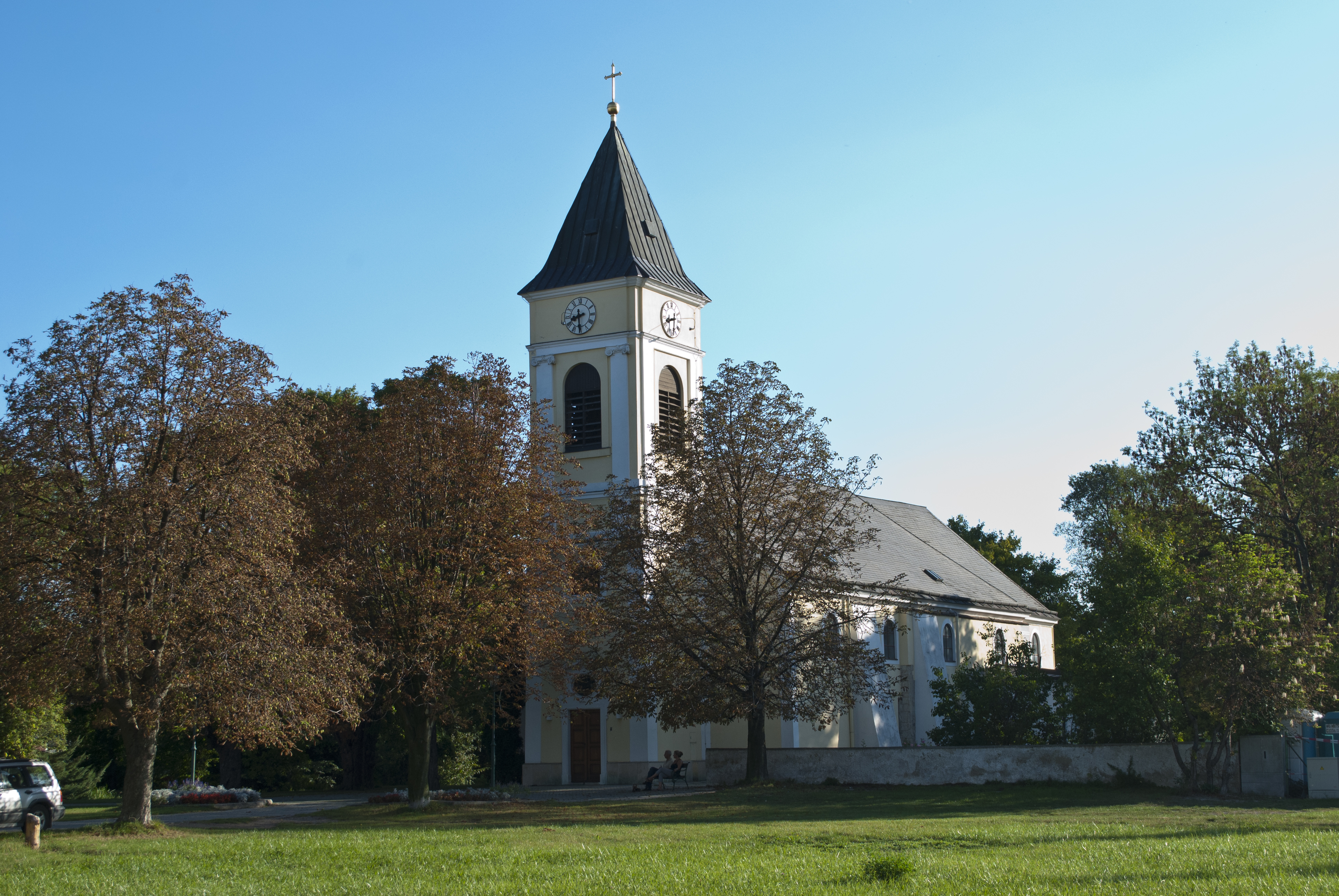 Kath. Pfarrkirche hl. Laurentius und ehem. Friedhof